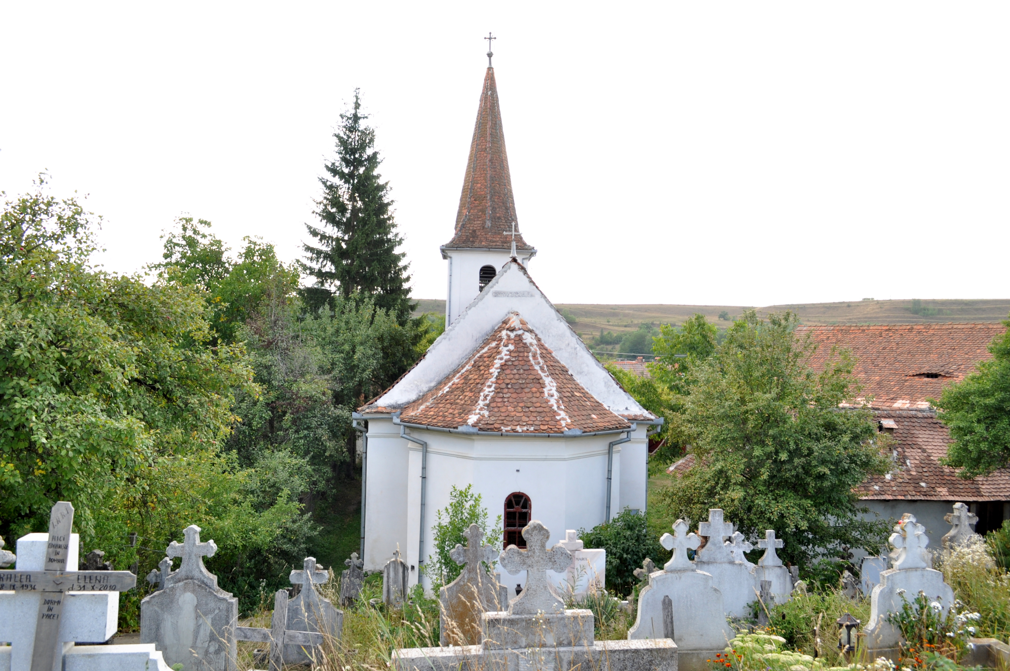 Biserica "Naşterea Domnului" , sat SĂRATA; comuna PORUMBACU DE JOS